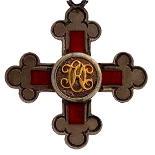 Württembergischer Olgaorden